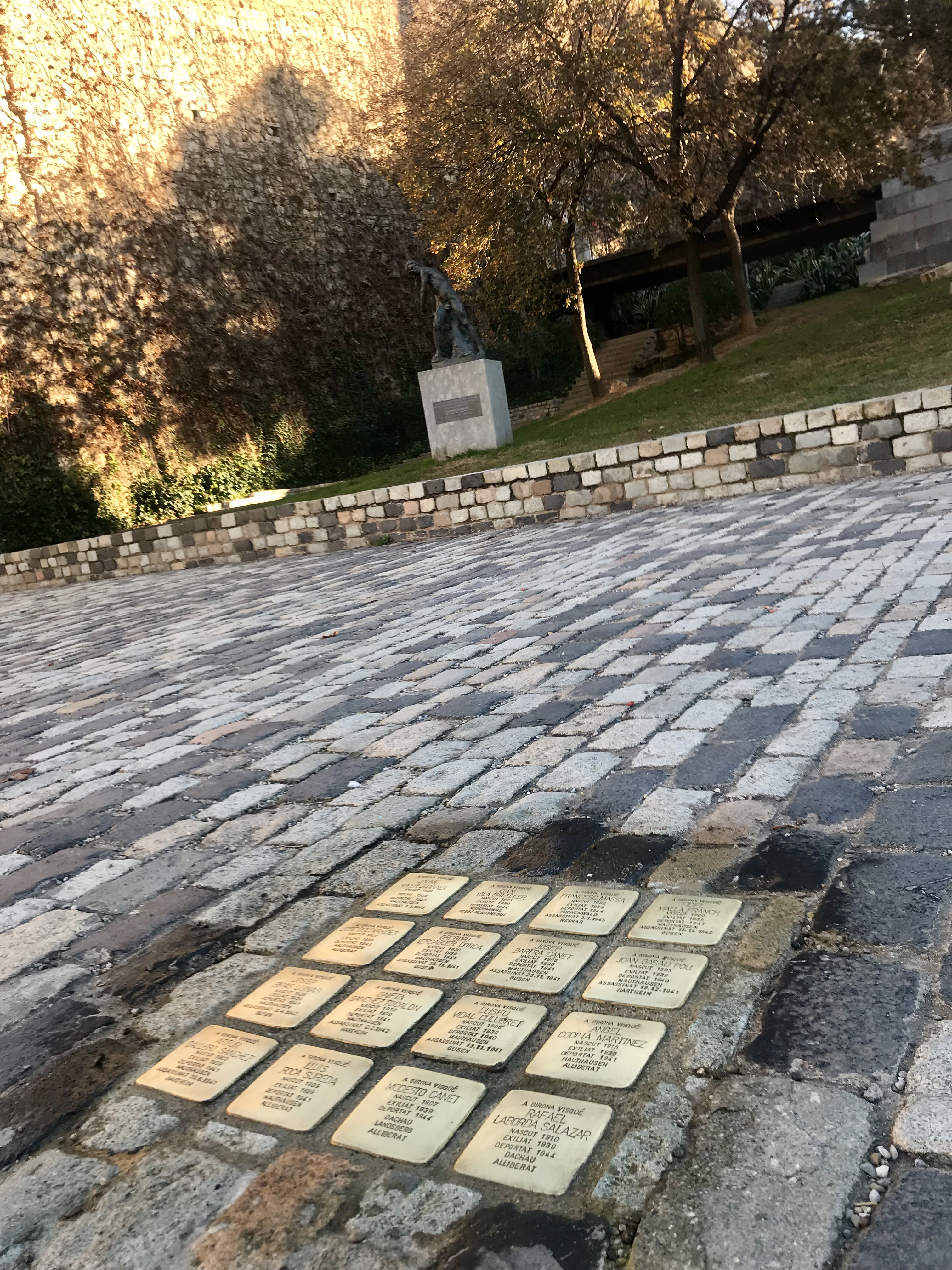 Stolpersteine in Girona, Jardí de la Infància